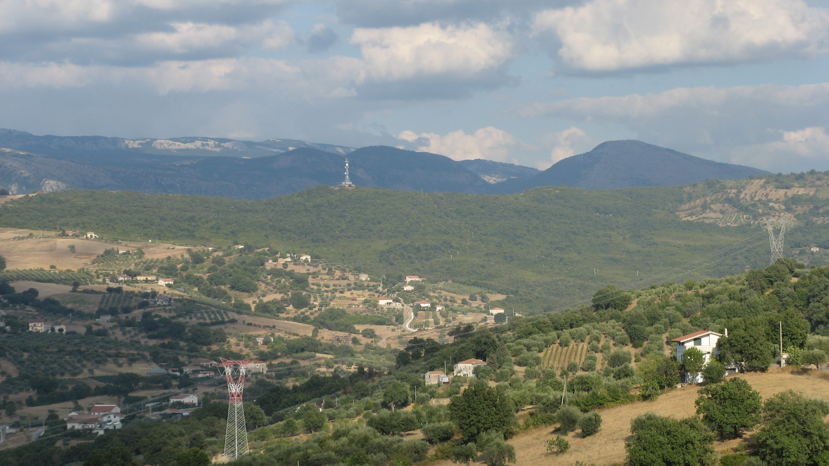 Albanella, località Bosco Camerine.